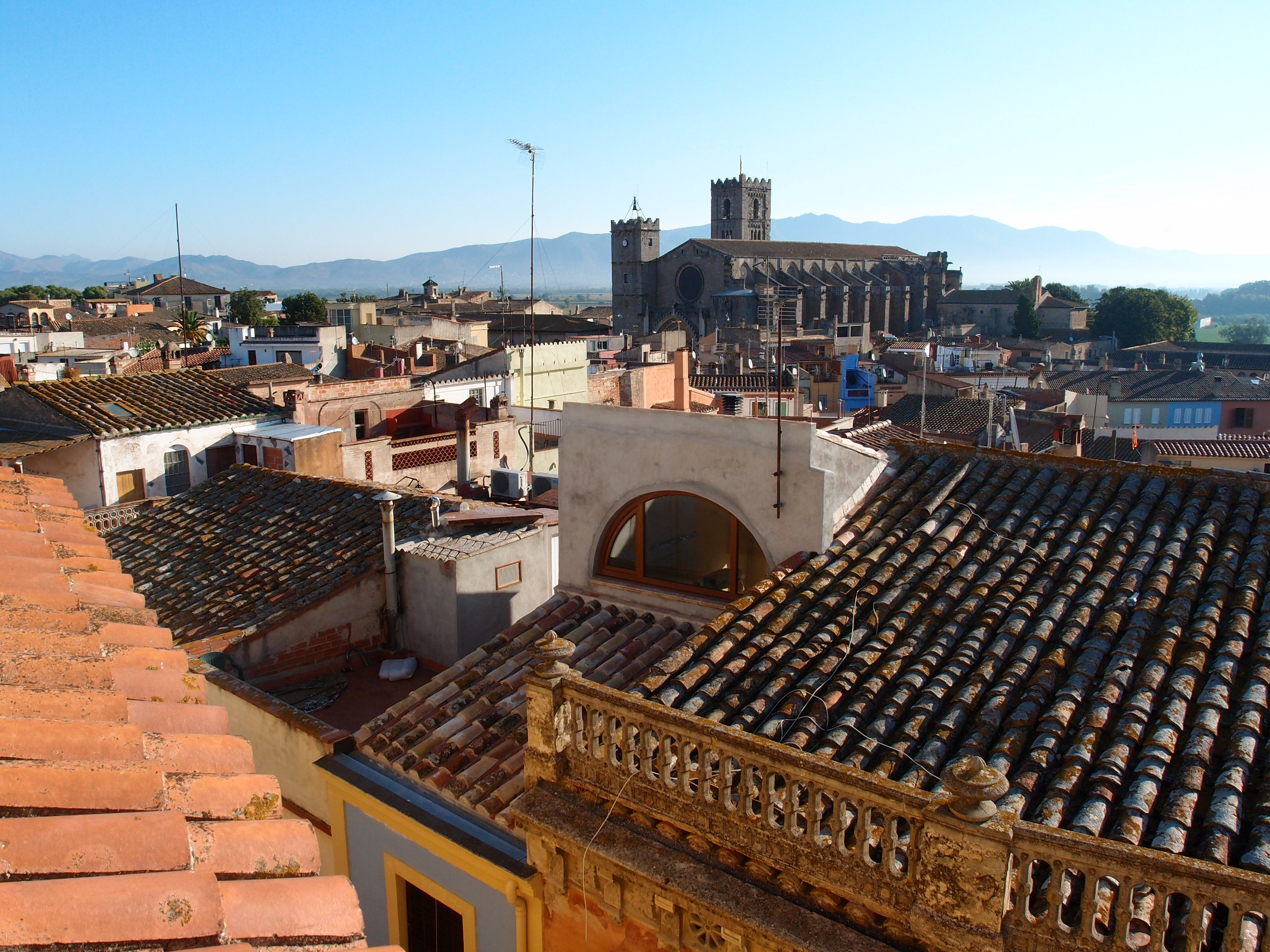 Castelló d’Empúries Datum: 06.09.2010 Urheber: Michael Pfeiffer alias Benutzer:Gordito1869 Quelle: privates Fotoarchiv des Urhebers